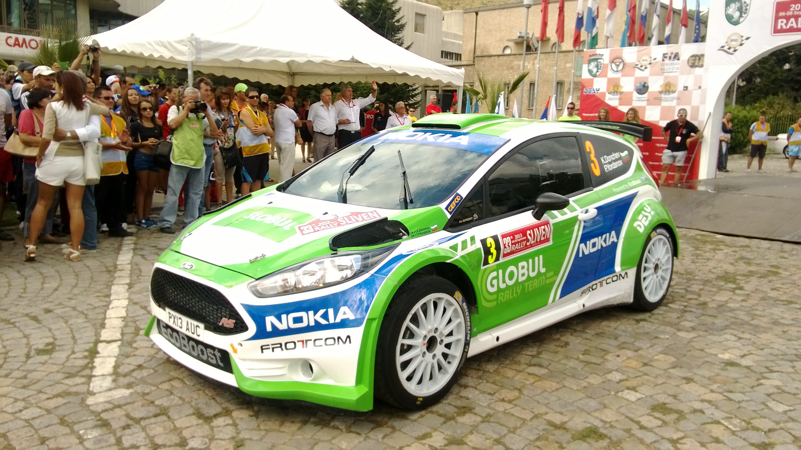 Спортният автомобил Форд Фиеста R5 на петкратният рали шампион на България - Крум Дончев